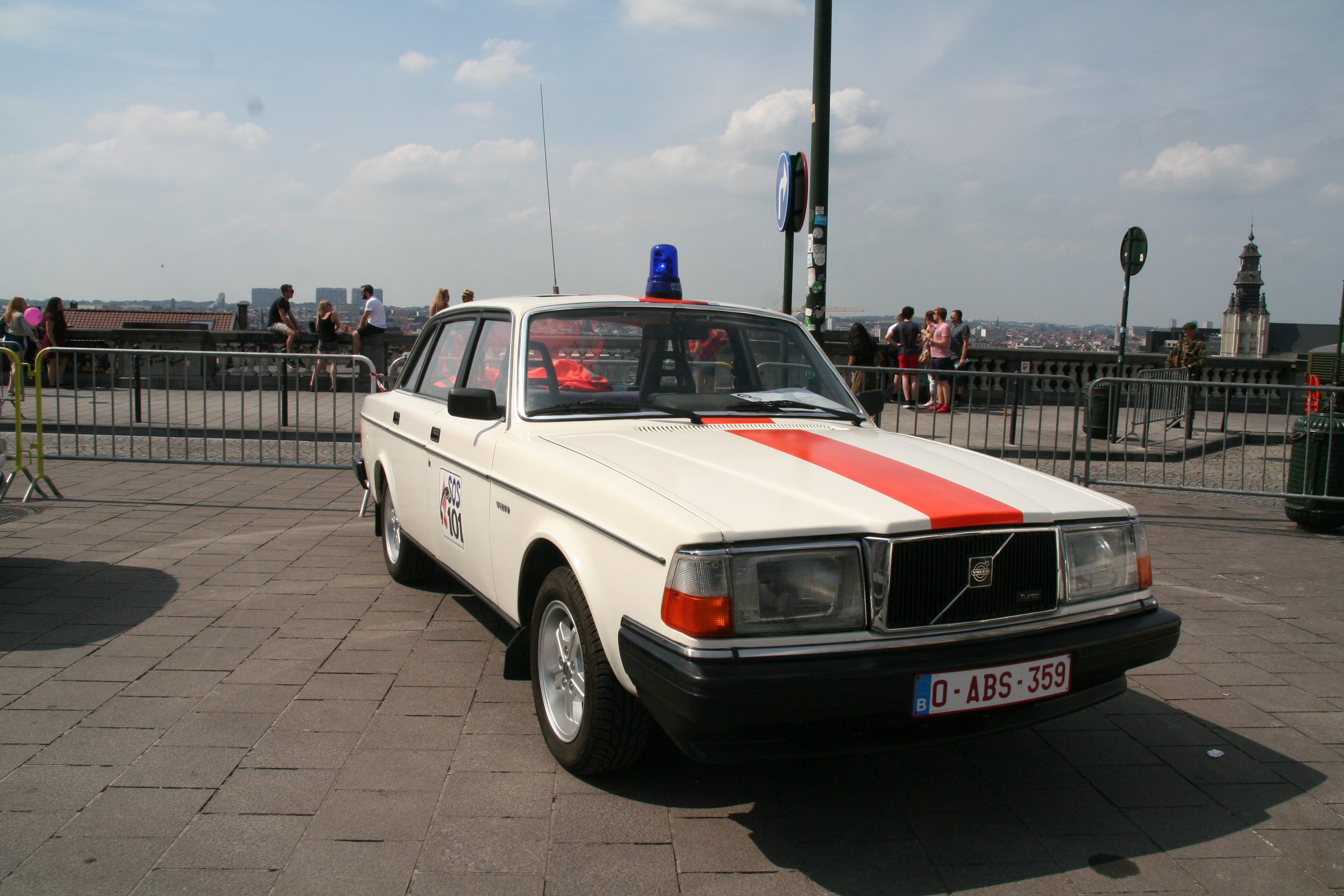 Fête nationale belge à Bruxelles le 21 juillet 2016 - Volvo de la Gendarmerie belge - Gendarmerie (Belgium)